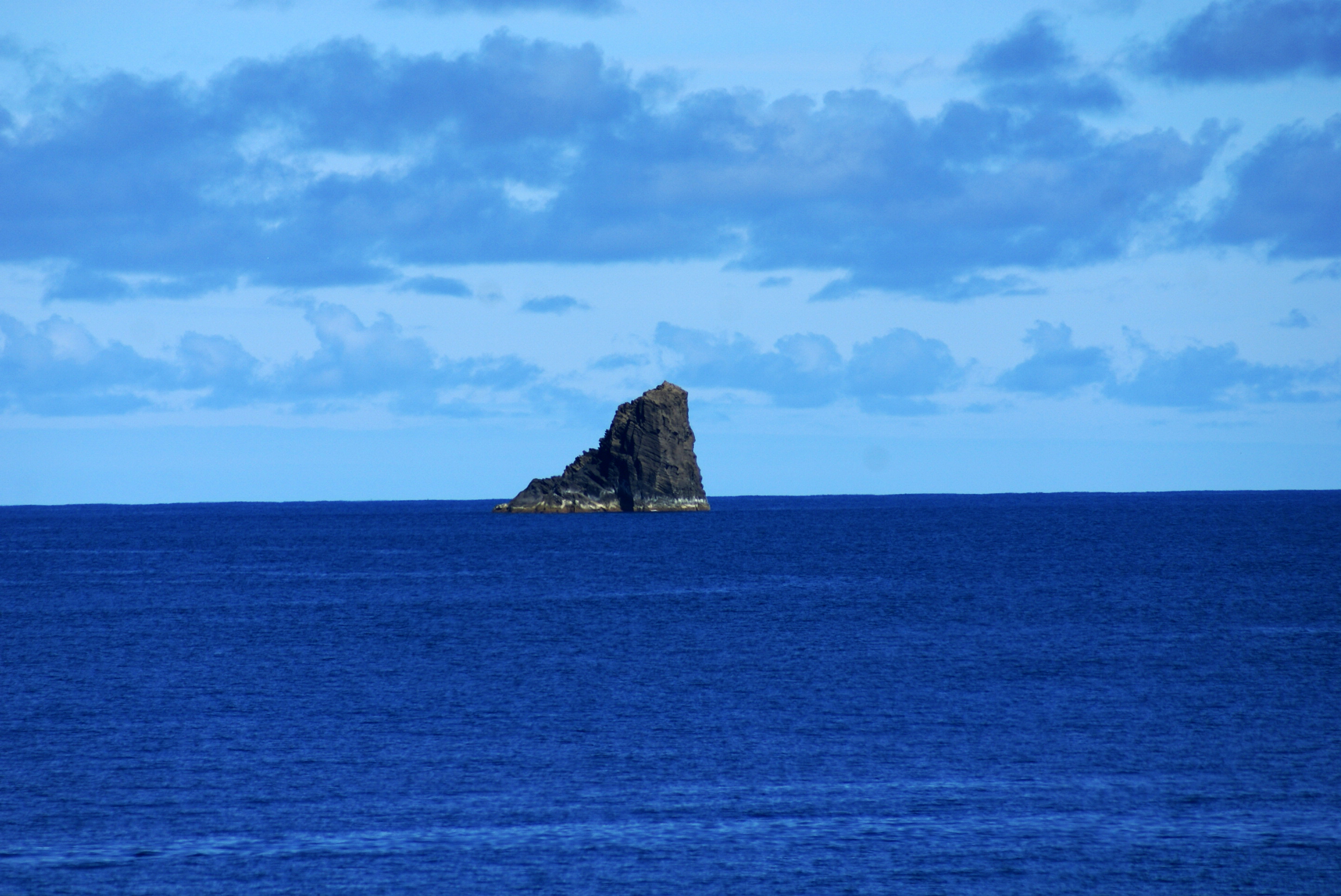 Ilhéu de Monchique o ponto mais ocidental da Europa, ilha das Flores, Açores, Arquivo de Villa Maria, ilha Terceira, Açores